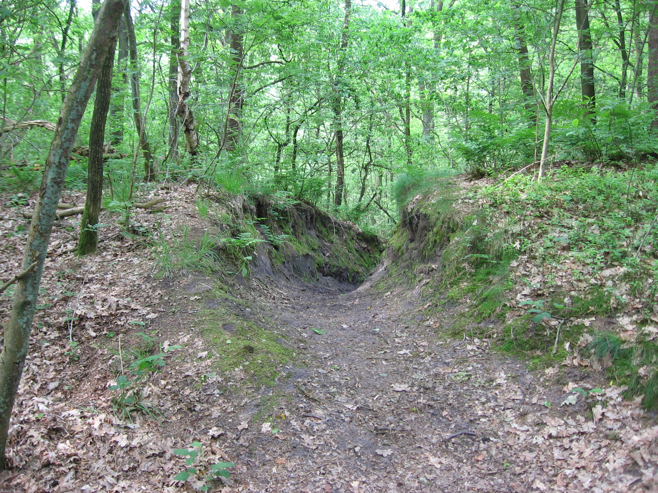 Der Burgwall bei Ottensen. Zu sehen ist der durch einen Pfad durchstochene Hauptwall.